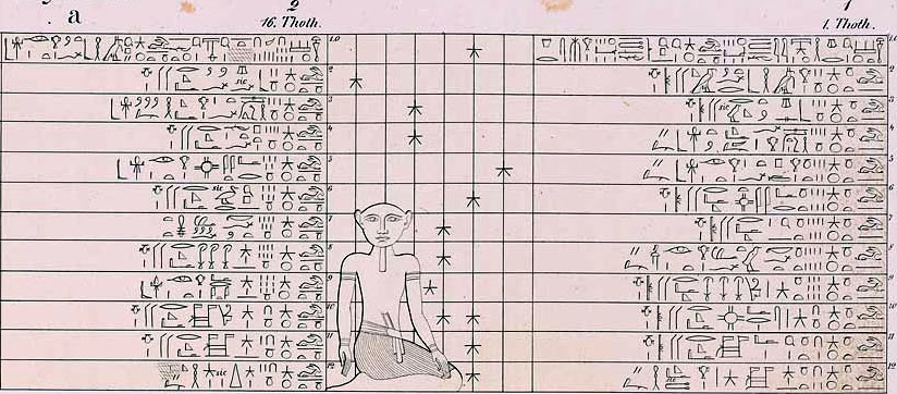 Ramessidische Sternuhr: Monat Thot mit Tafel 1+2 für den 1. und 16. Monatstag (Grab des Ramses IX.)